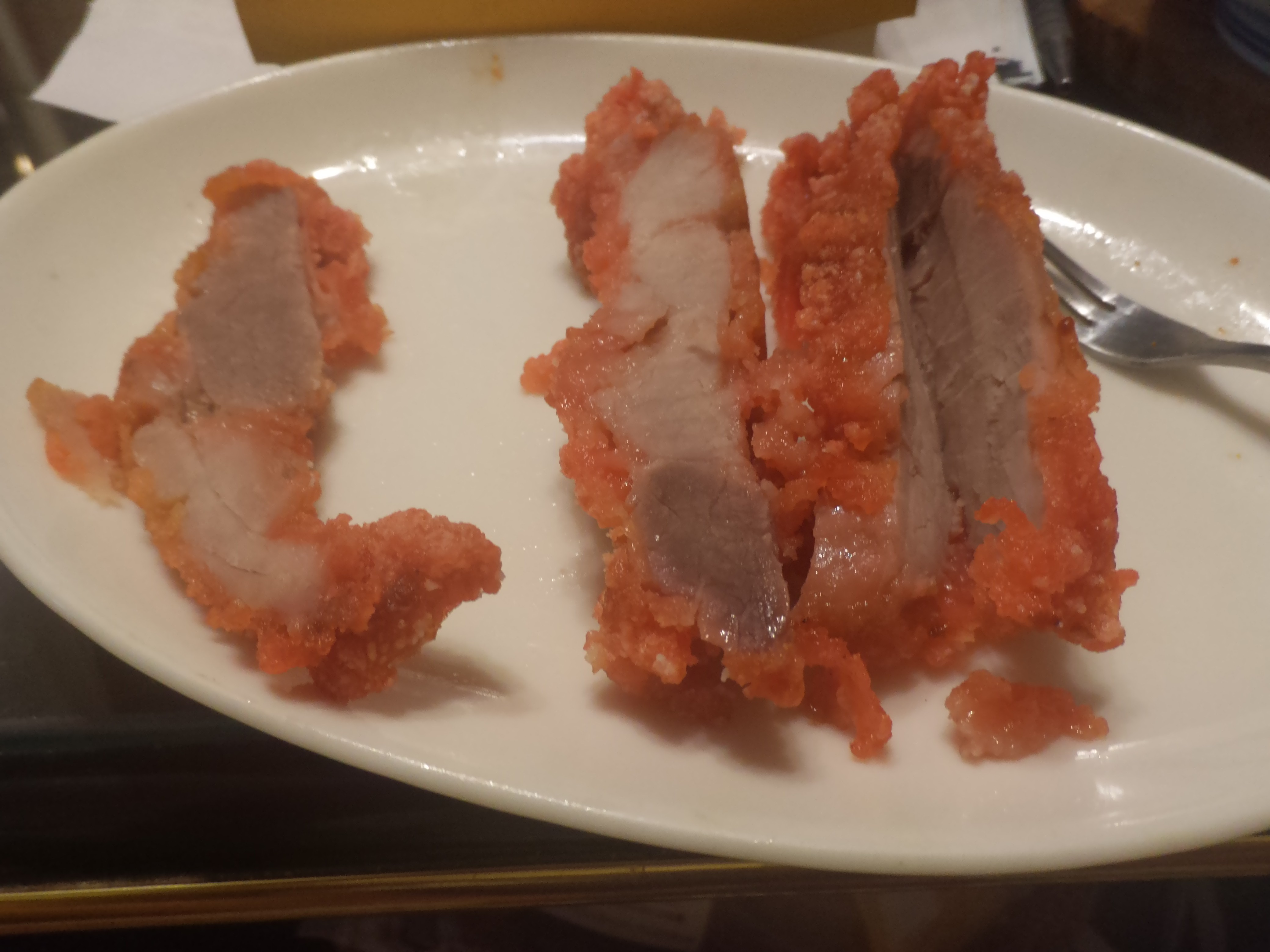 中文（台灣）: 台灣紅燒豬肉